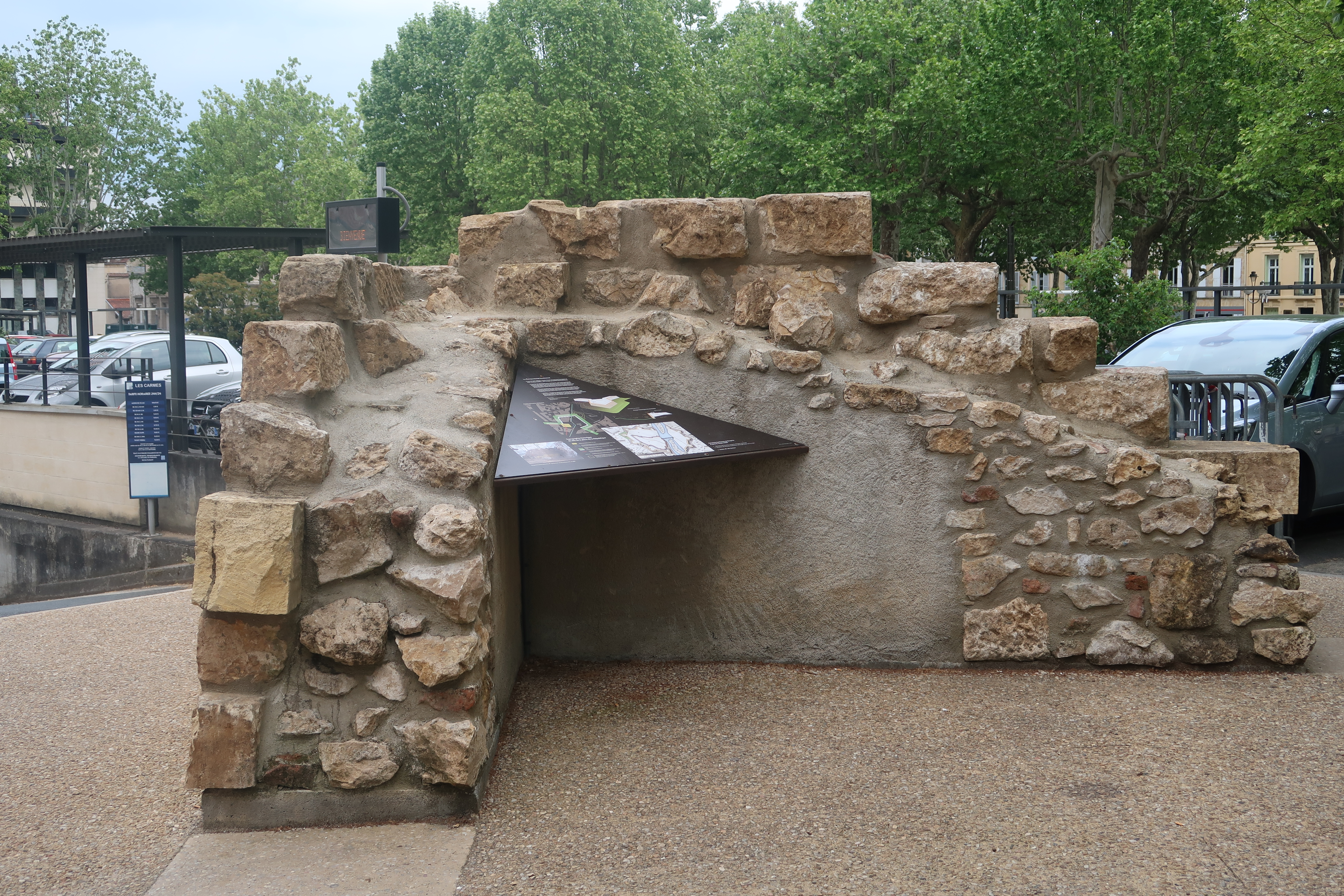 Vestige du bastion des Carmes (1577-1621), place de la République à Bergerac (Dordogne). Découvert lors de travaux en 2007.